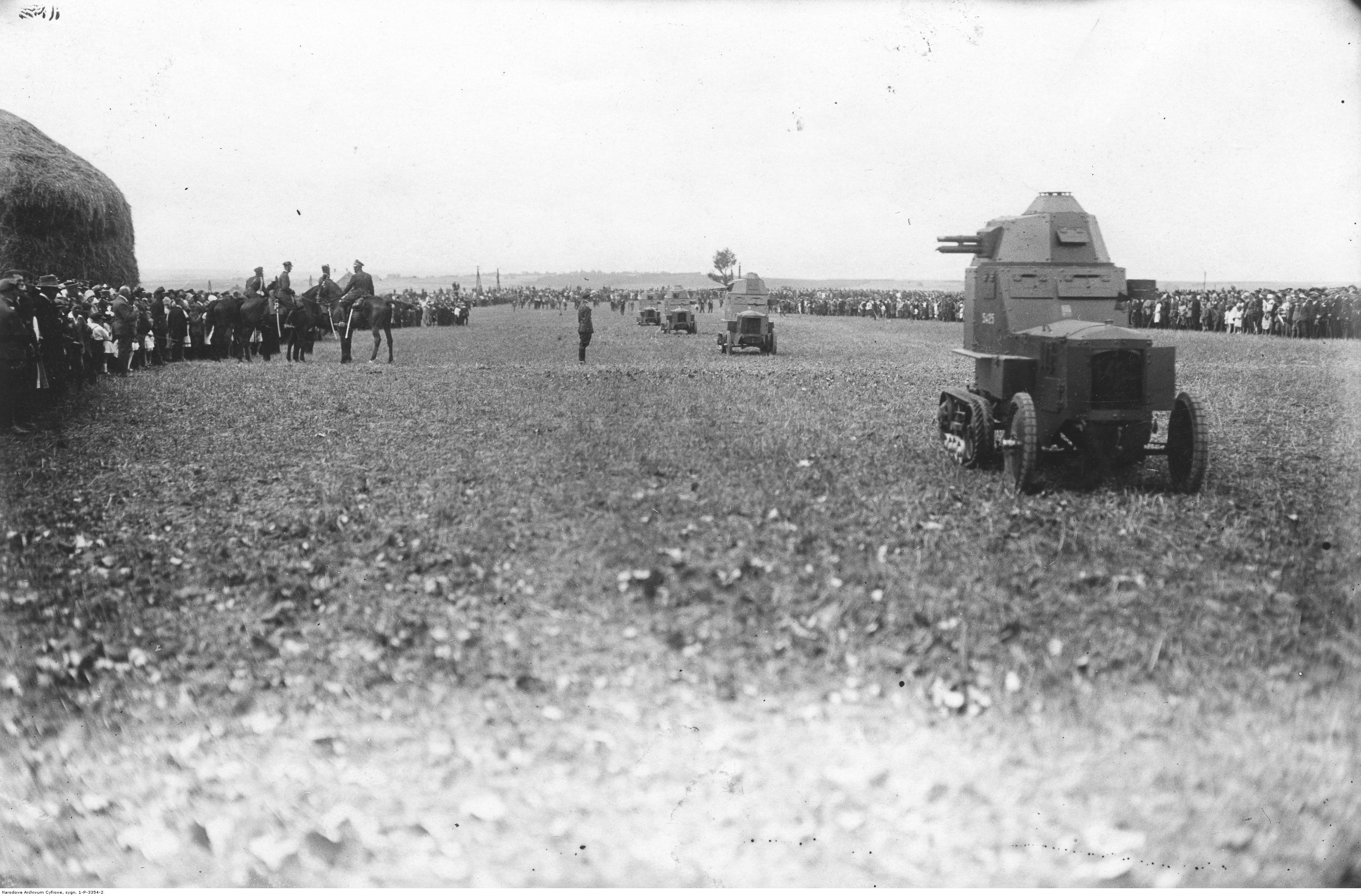 Uroczystości Święta Żołnierza w Miechowie z okazji rocznicy Bitwy Warszawskiej 1920 roku zwanej "cudem nad Wisłą". Półgąsienicowe samochody pancerne wz. 28 podczas defilady.